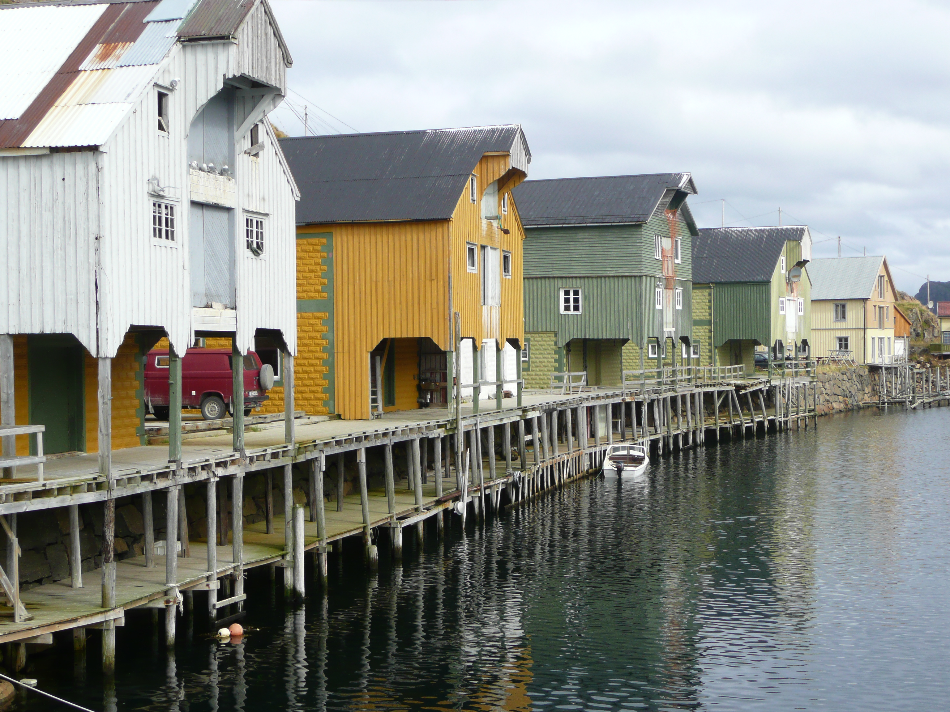 Brygger i Nyksund, Vesterålen.